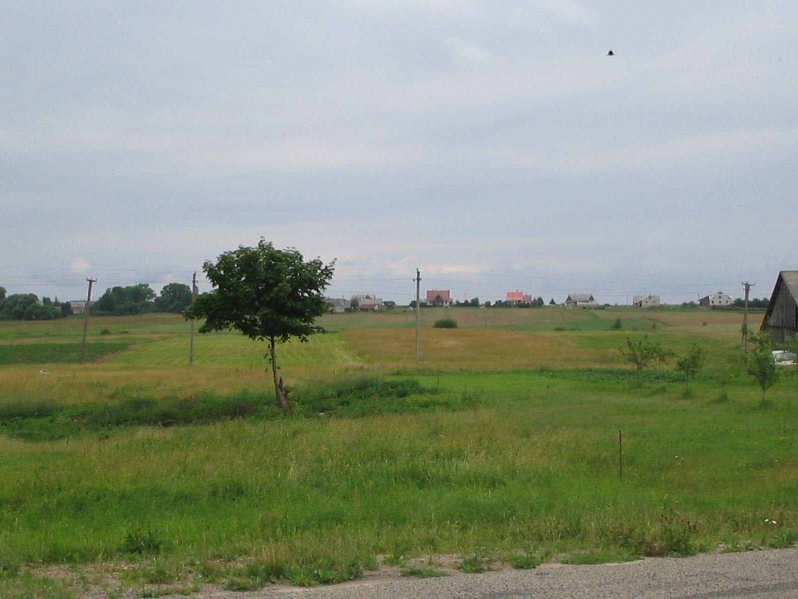 Vladikiškės